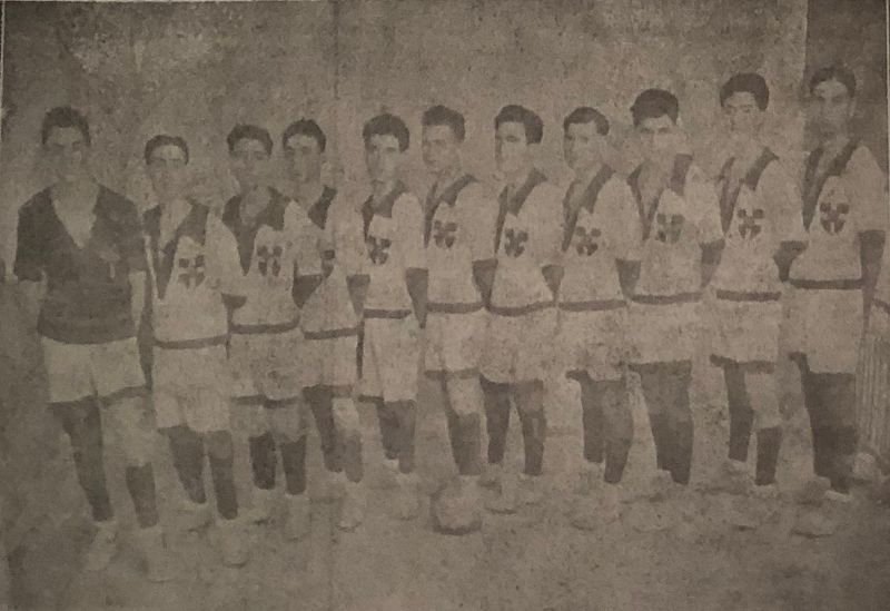 Foto di gruppo della prima squadra del 75° Reggimento Fanteria